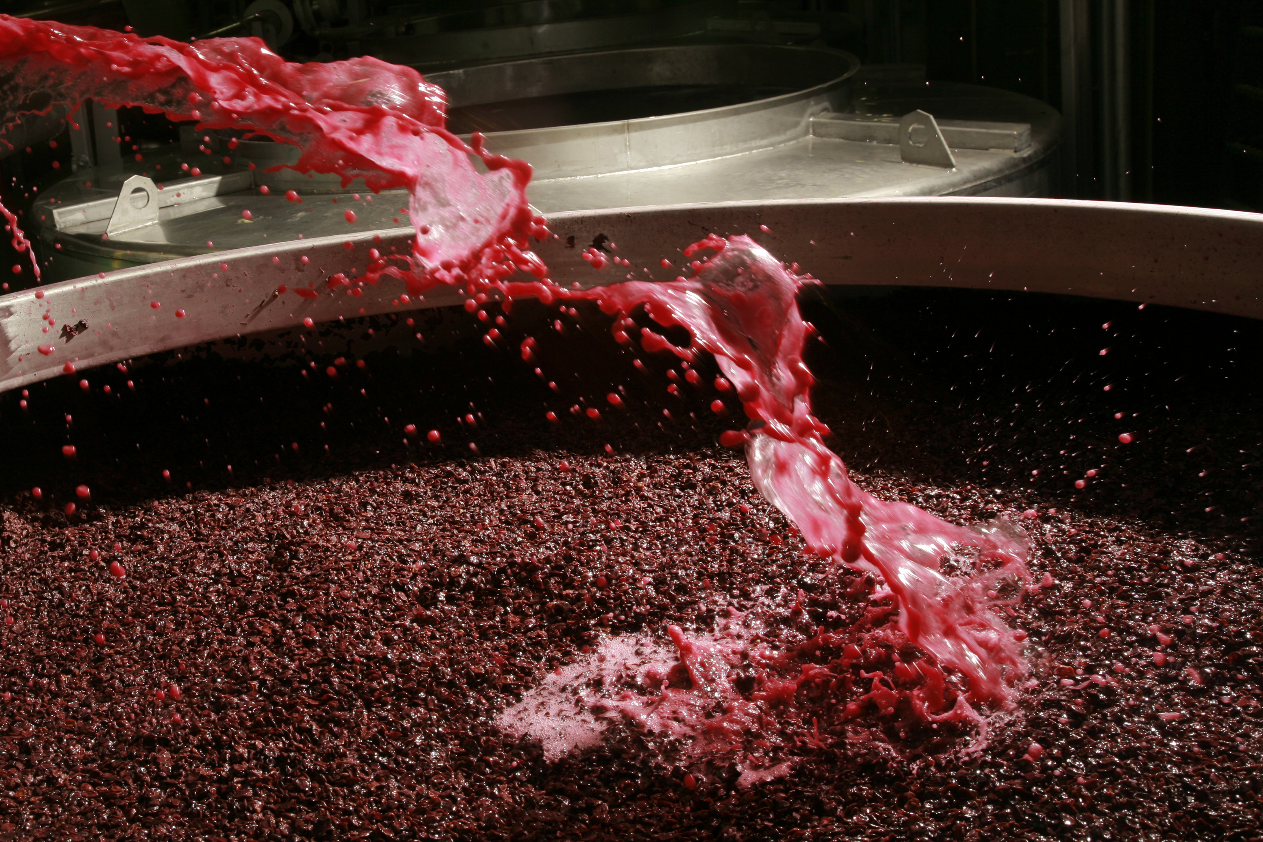 Vinification-Château de Meursault